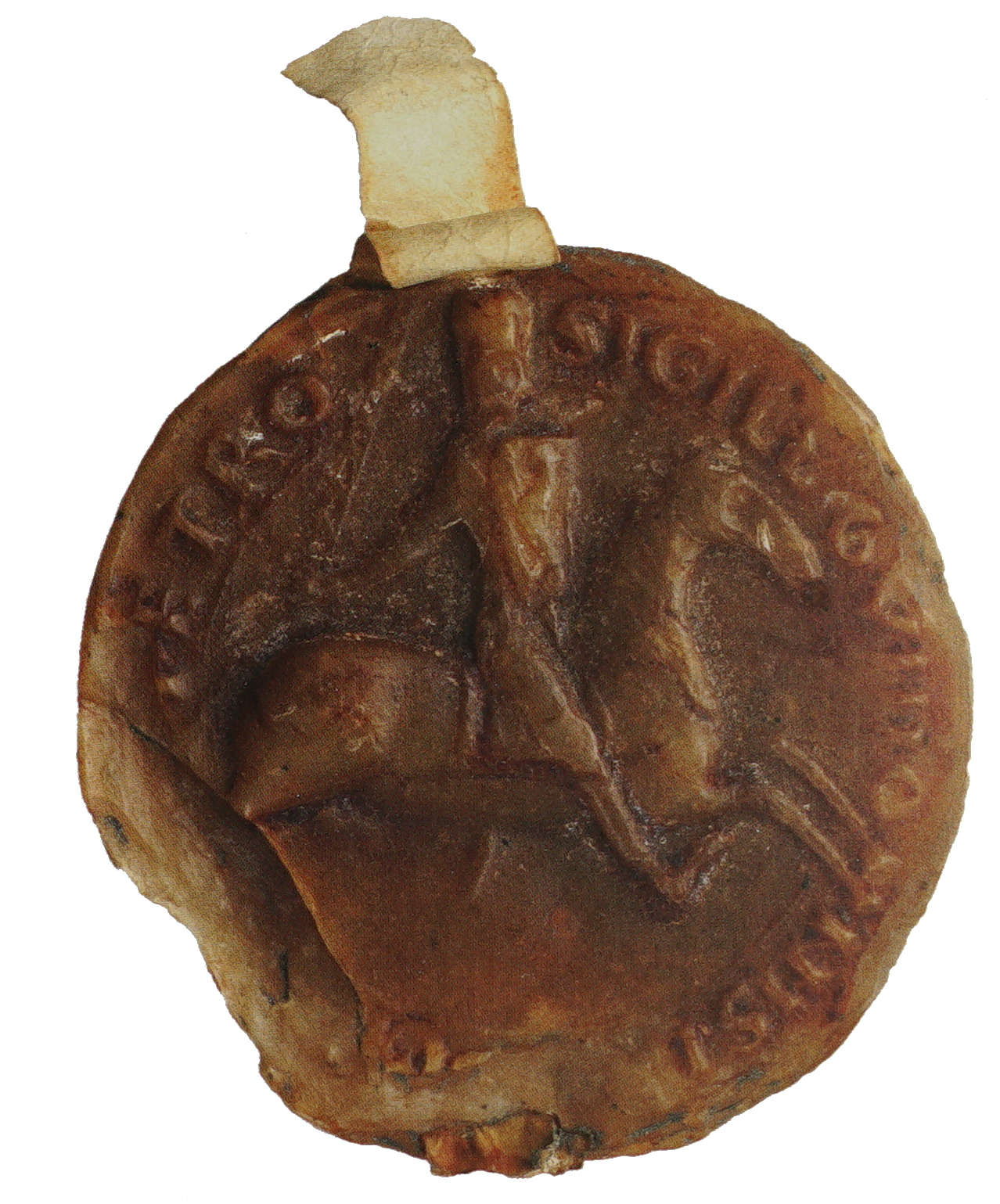 cf. titre de l'image